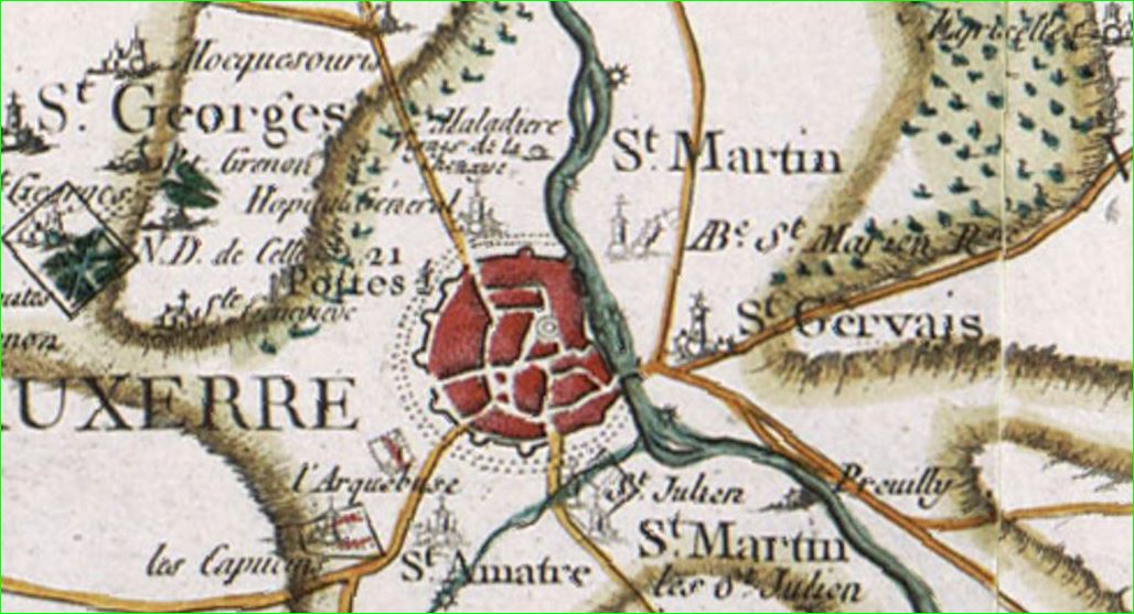 Auxerre et faubourgs sur la carte de Cassini : Saint-Martin, l'abbaye Saint-Marien déjà en ruines, Saint-Gervais, Saint-Julien, Preuilly, Saint-Martin-lès-Saint-Julien (à ne pas confondre avec Saint-Martin-lès-Saint-Marien, église de l'abbaye Saint-Marien), Saint-Amâtre, l'Arquebuse, Les Capucins, l'église Sainte-Geneviève, Notre-Dame de Celle, Saint-Georges-sur-Baulche, la Maladière et les vignes de la Chênaye, Mocquesouris, et Égriselles (commune de Venoy) au nord-est. L'Yonne alimentait quatre moulins près d'Auxerre, avec d'amont en aval : le moulin du Batardeau à environ 400 m en amont de l'actuel pont Paul Bert ; le moulin environ 300 m en aval du pont Paul Bert ; le moulin Mi-l'Eau, parfois appelé moulin Millot ou Mileau, à l'endroit de l'actuelle capitainerie du port d'Auxerre, à peu près en face de la cathédrale (mal distinguable) ; le moulin Brichoux au début de son bief artificiel ; le moulin du Président, lui aussi alimenté par le même bief. Le moulin Judas est en rive gauche en face du moulin Brichoux. Plus en amont, le ru de Vallan passant par Saint-Amâtre y alimentait lui aussi un moulin.